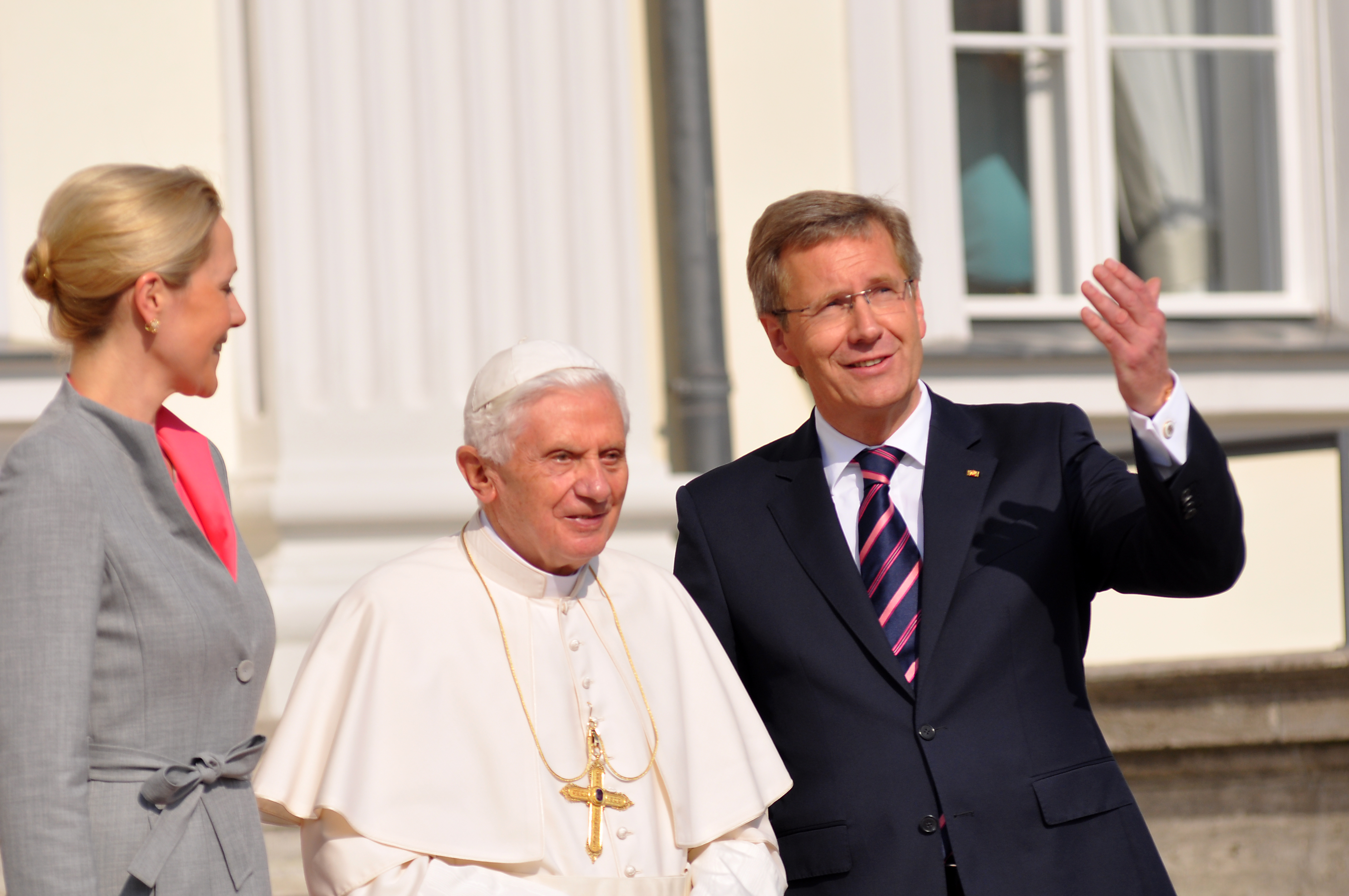 Begrüßung von Papst Benedikt XVI. durch Bundespräsident Christian Wulff und Frau Bettina Wulff vor dem Schloss Bellevue in Berlin.